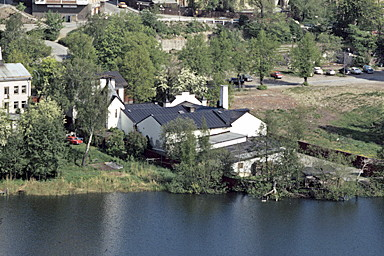 Nynäs, Gröndal. Bilden troligen från början av 1970-talet. Byggnaden för "Frosts hudar"